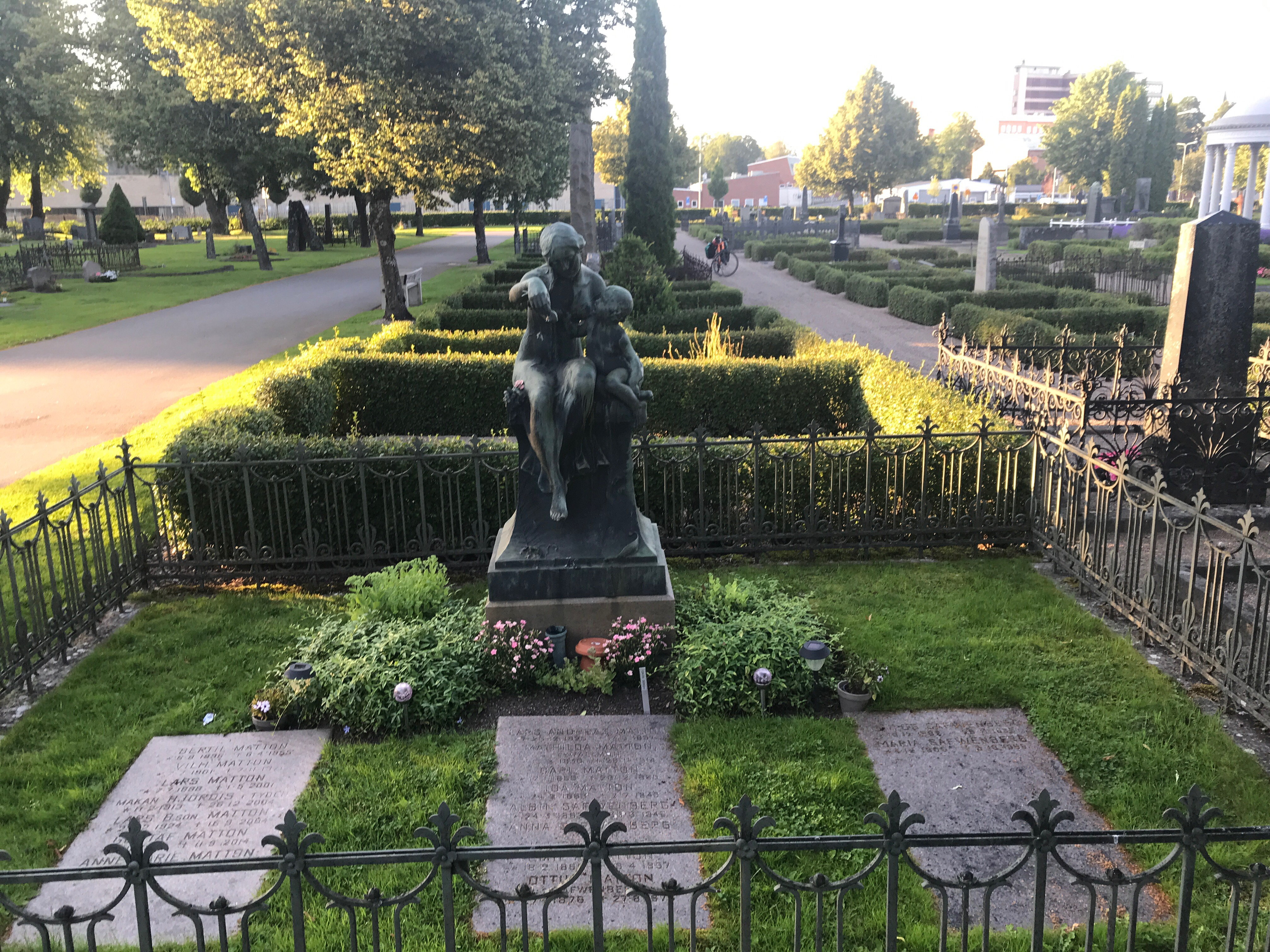 Gävle gamla kyrkogård